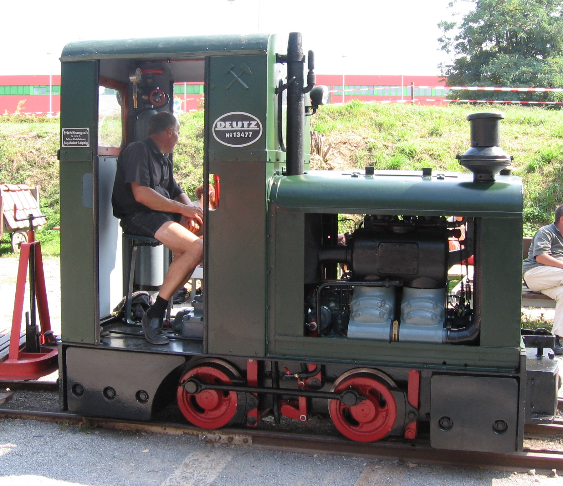 Feldbahnlok Deutz OMZ 117 mit 2 Zylindern. Spurweite 600 mm. Foto: Michael Linnenbach 10:01, 21. Feb 2006 (CET) GNU-FDL